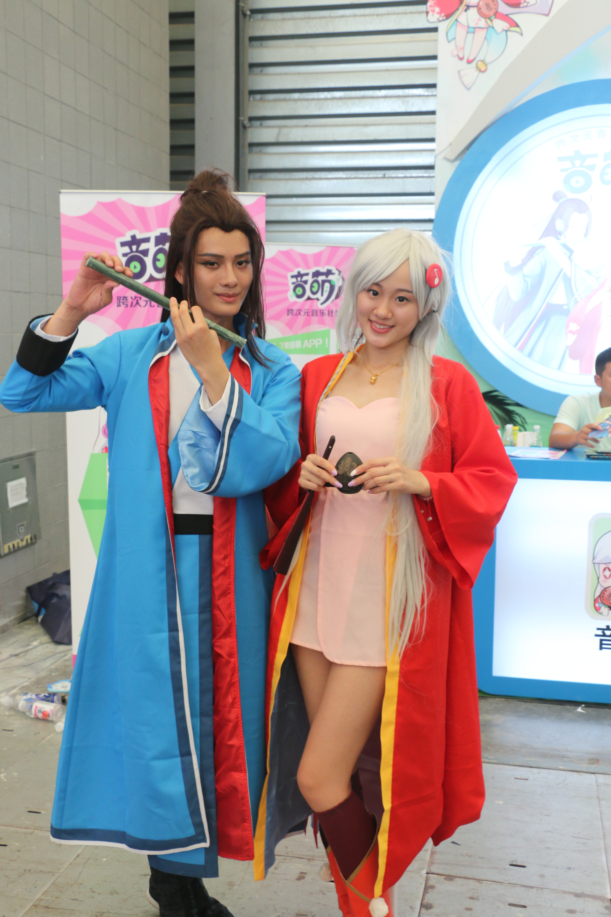 2015ChinaJoy Cosplay 第二集